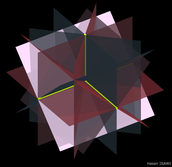 نجمة مستويات ، في الهندسة الوصفية تشير الى مجموعة لانهائية من المستويات التي تشترك بنقطة واحدة فقط، التي تسمى مركز النجمة. من ناحية أخرى ، فإن نجمة مستويات لانهائية تشير الى مجموعة من المستويات الموازية لخط مستقيم معين.